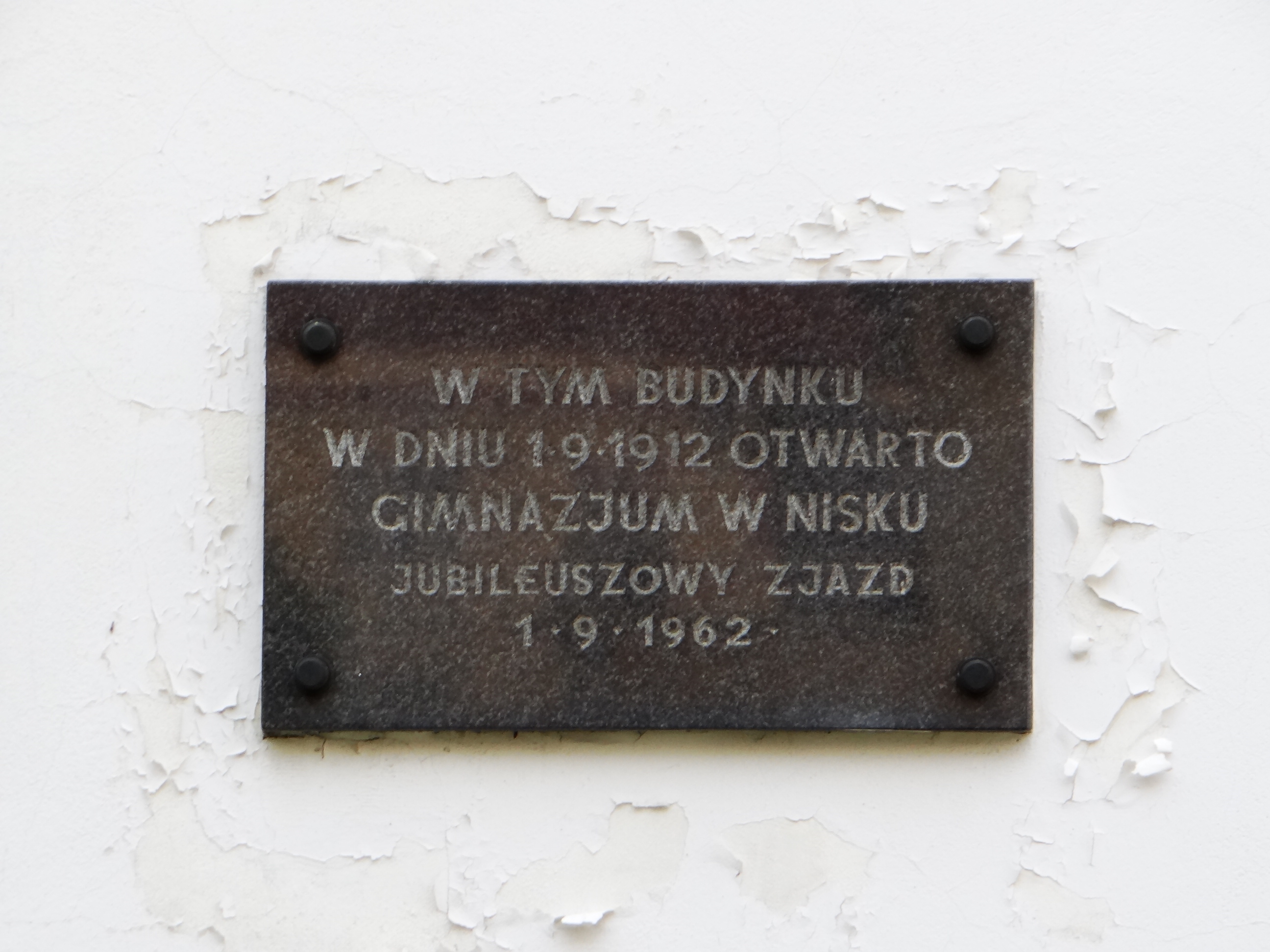 Zdjęcie wykonane w miejscowości Nisko.